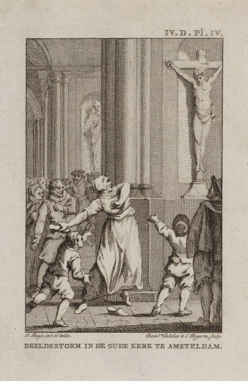 Beschrijving Beeldenstorm in de Oude Kerk te Amsteldam Beeldenstorm in de Oude Kerk. Datering voorstelling:1566. Techniek: gravure. Documenttype prent Vervaardiger Buys, Jacobus (1724-1801) Bogerts, C. (1745-1817) Vinkeles, R. (Reinier ; 1741-1816) Collectie Collectie Stadsarchief Amsterdam: tekeningen en prenten Datering 1790 ca. Geografische naam Oudekerksplein Gebouw Oude Kerk Inventarissen Afbeeldingsbestand 010097007251